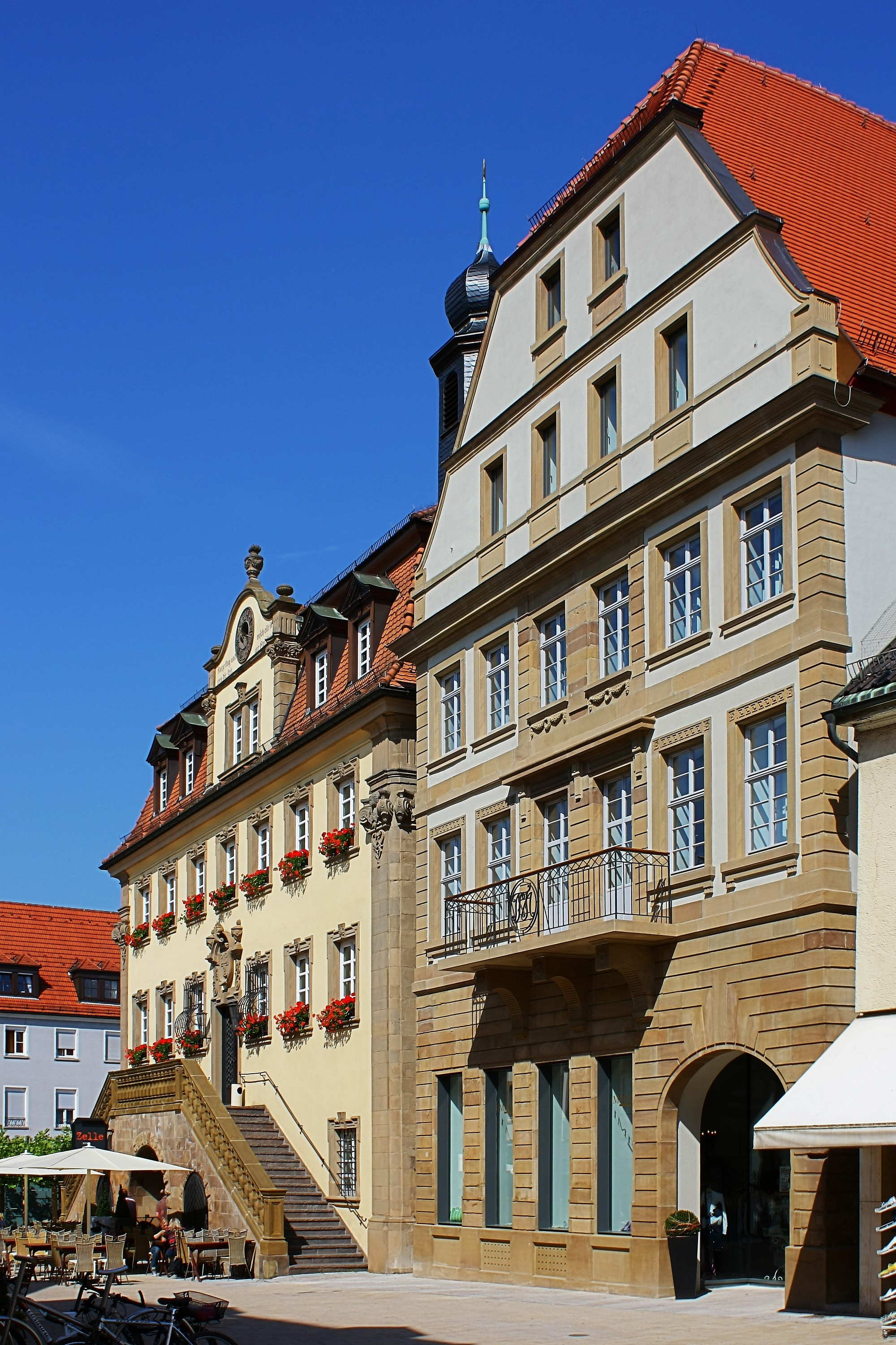 Der ehemalige Gasthof "Zur Rose" (rechts), direkt neben dem Rathaus, erbaut 1548, rekonstruiert 2007 bis 2009, hier befindet sich heute im 1. bis 3. Obergeschoss das Stadtarchiv Neckarsulm